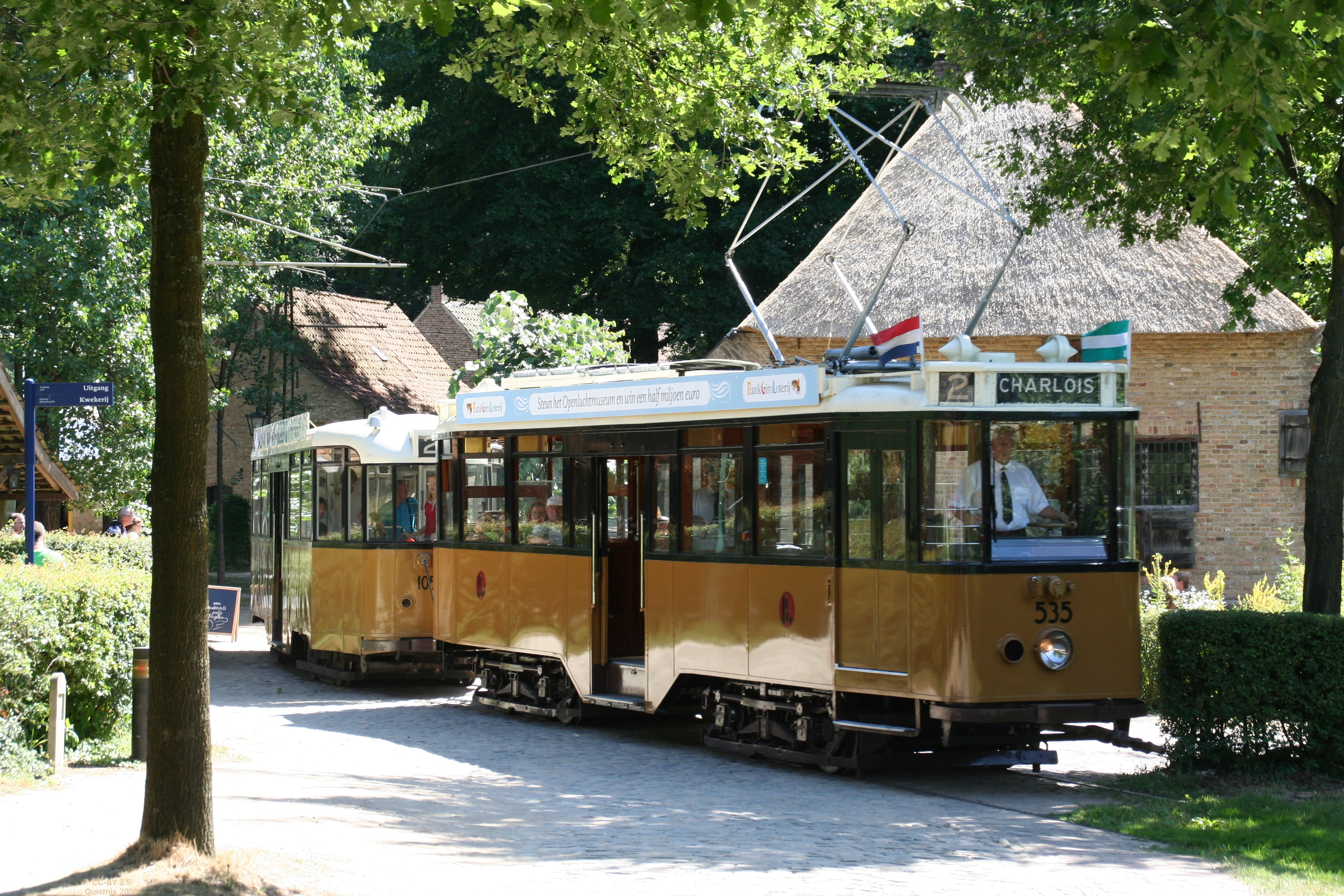 Tramstel van de RET in het Nederlands Openluchtmuseum. Materieel uit de 500-serie.